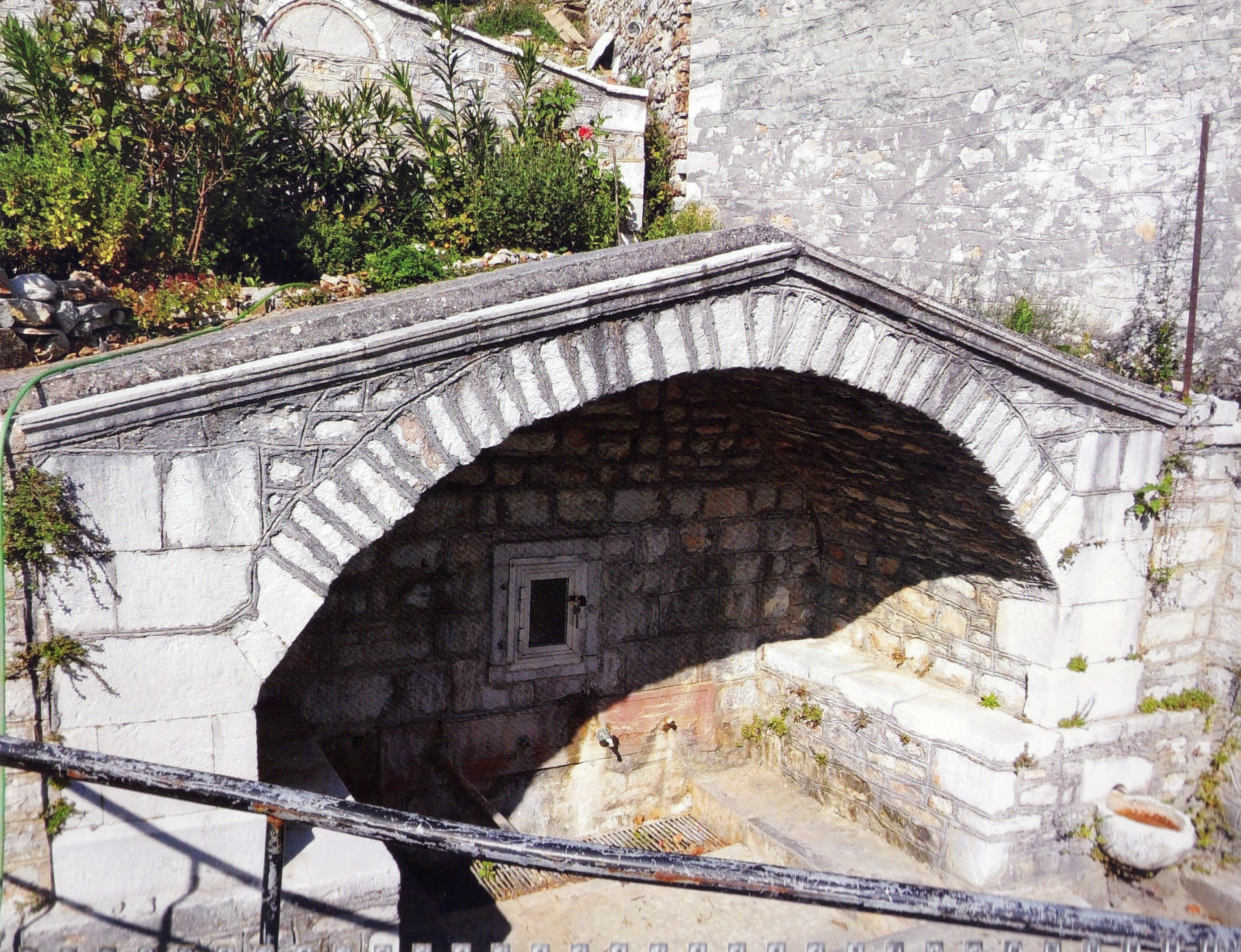 Δημόσια βρύση στον Ίσαρη